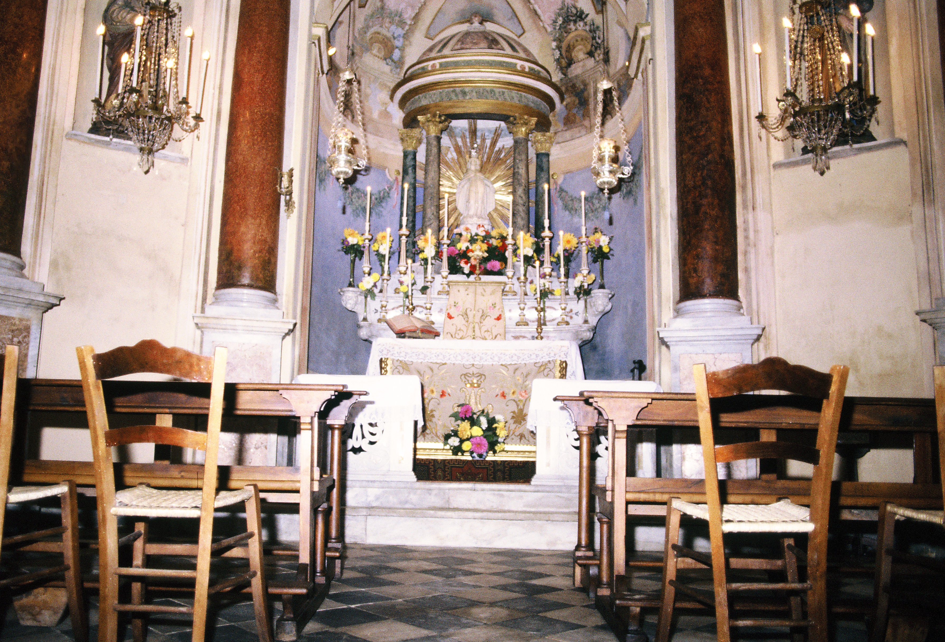 Gli interni della Cappelletta